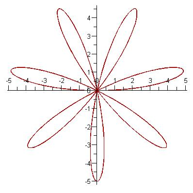 Grandi's rose